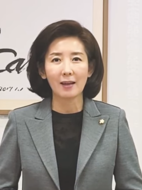 나경원 전 원내대표가 2020년을 앞두고 신년 연설을 하고 있다.